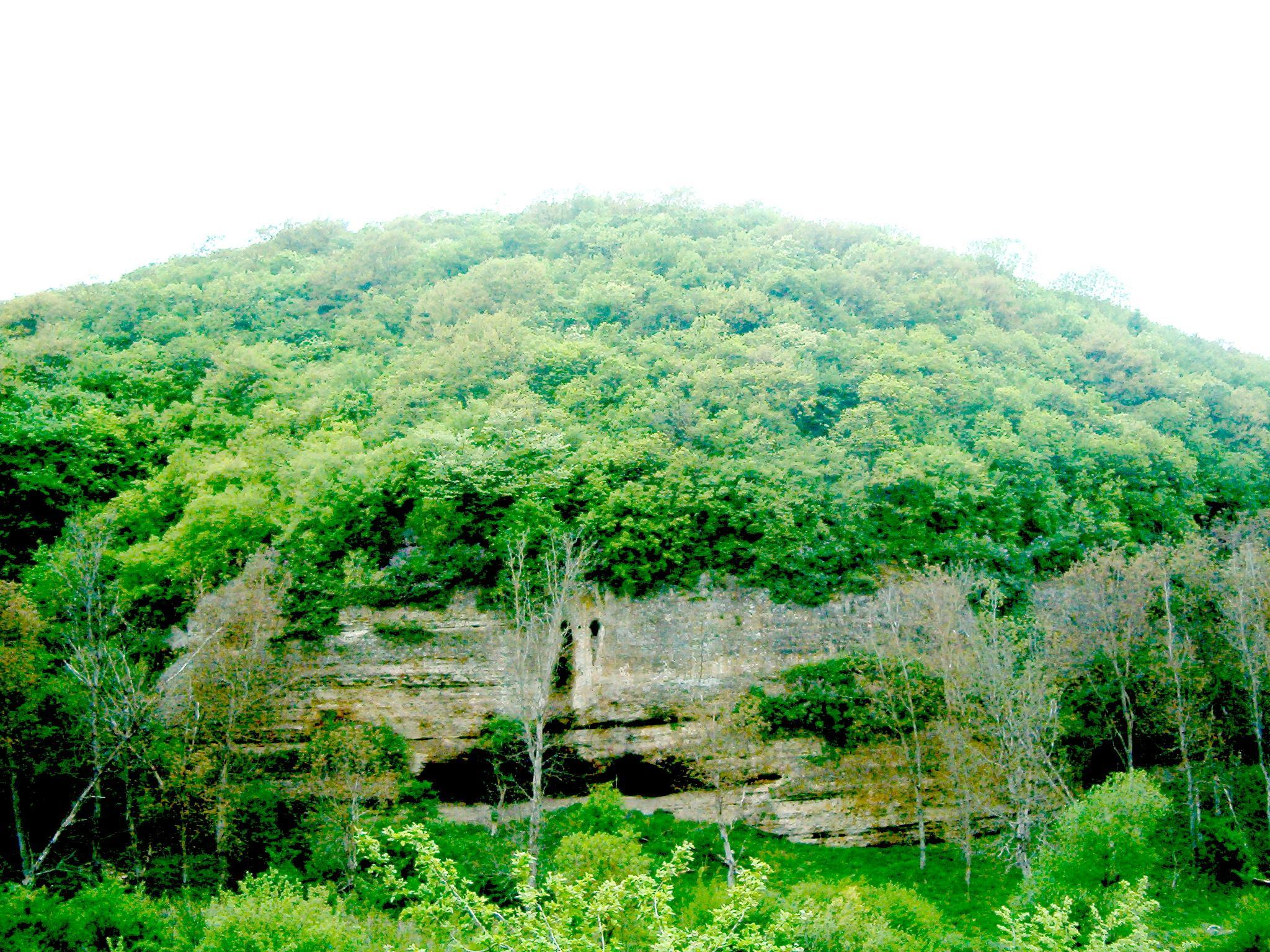 Хълмът, където скрити в гората се намират руините на античната и средновековна крепост Голямото кале (Буюк кале) при село Крепча, Опаченско